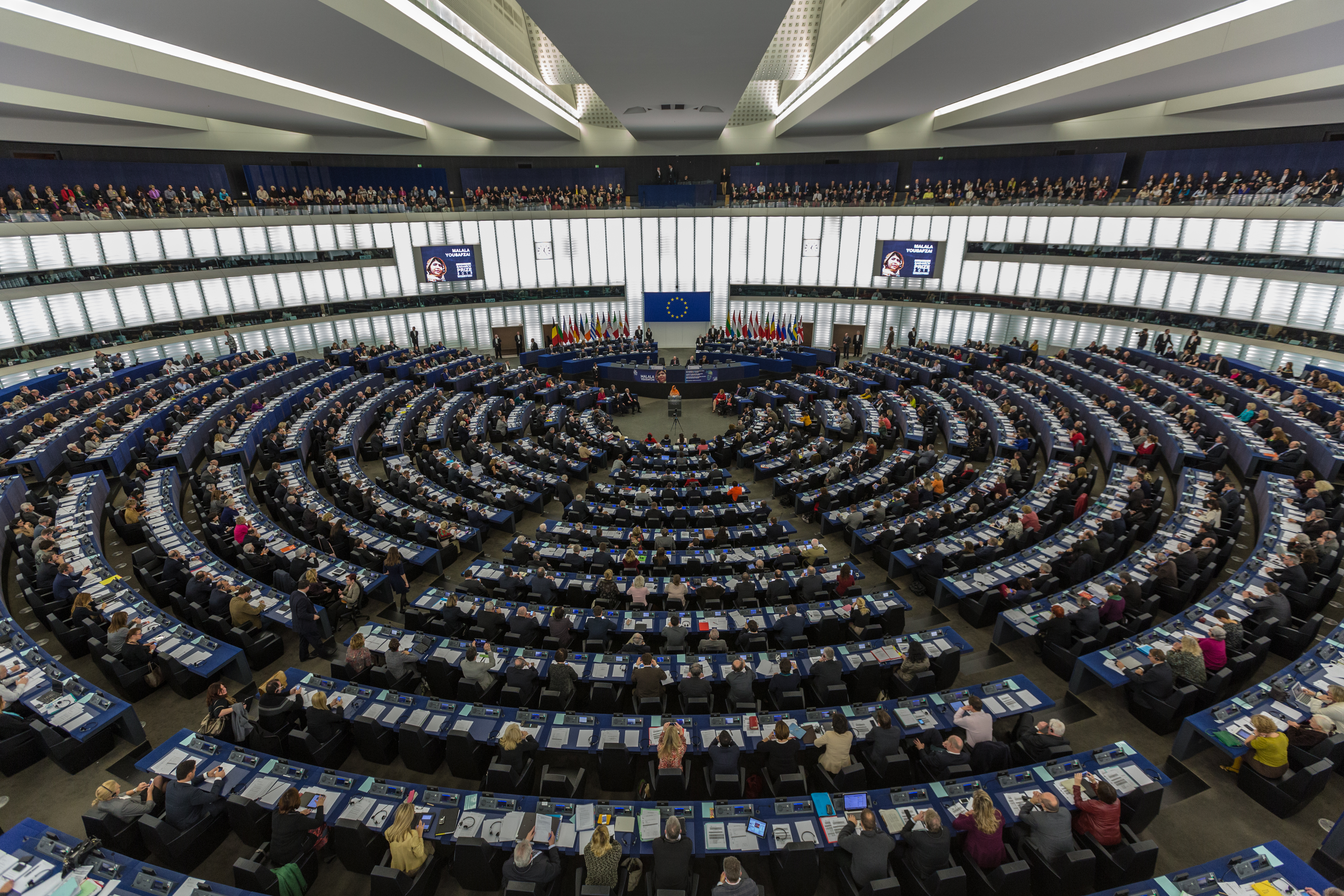 Remise du Prix Sakharov à Malala Yousafzai Strasbourg 20 novembre 2013.